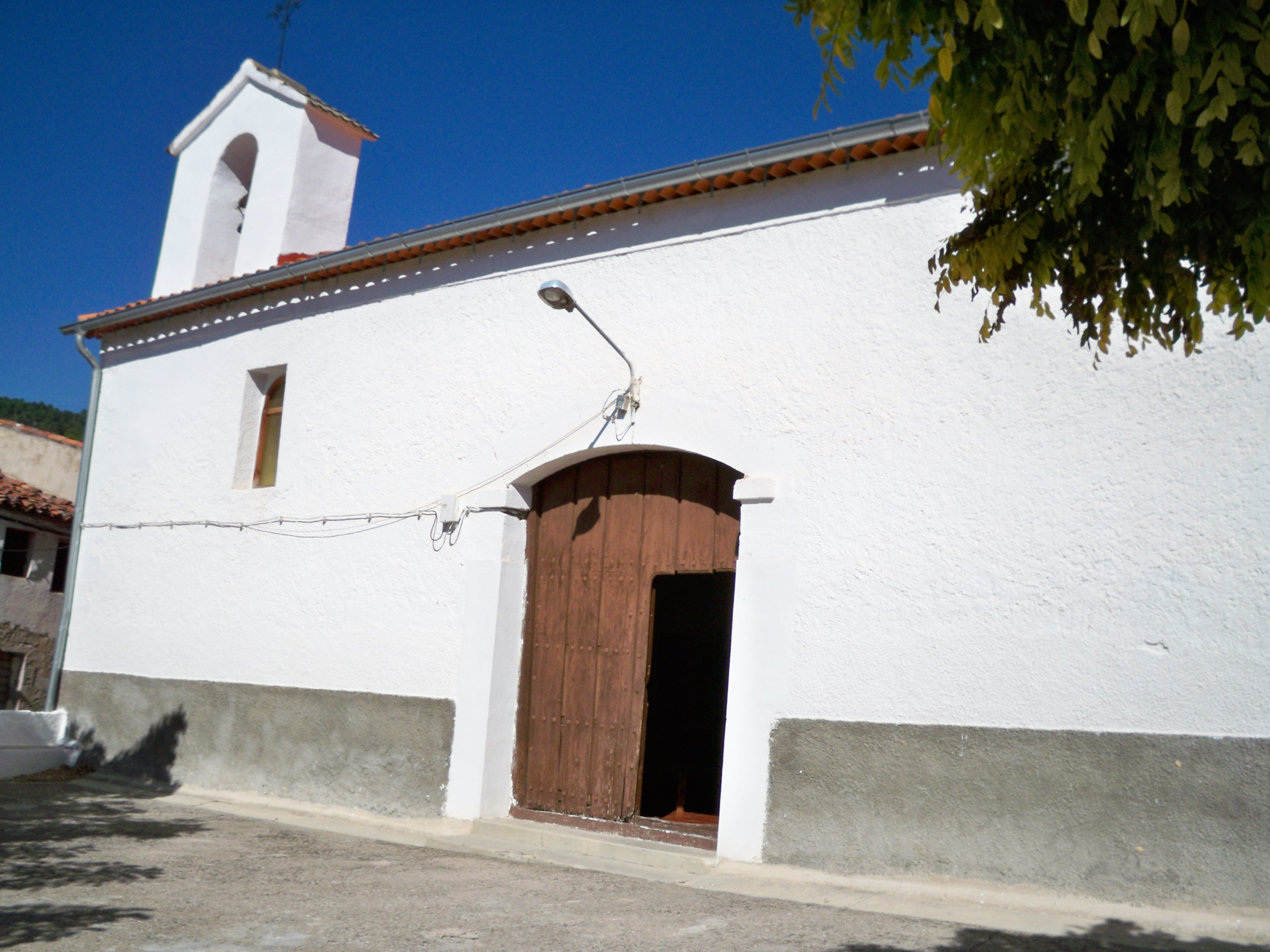 Vista del templo de San Pablo Apóstol de Cañada del Provencio (Molinicos)